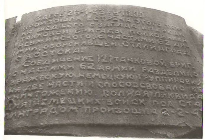 Памятная доска (часть 1) размещённая на танке Т-34 № 18 «Челябинский колхозник» — памятник в Волгограде установленный в честь завершения операции «Кольцо». Памятник является частью Мемориального комплекса «Героям Сталинградской битвы» на Мамаевом кургане.